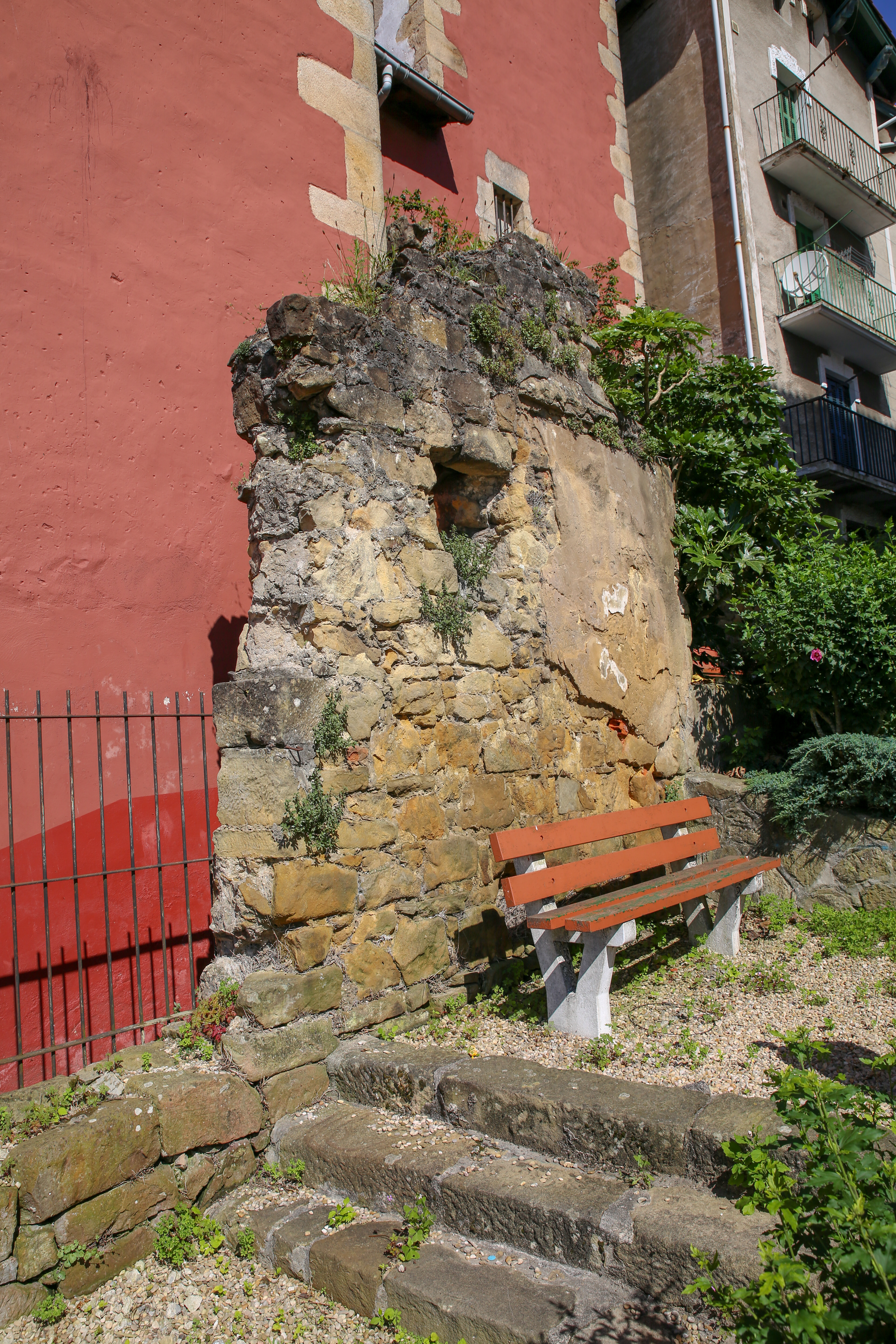 Casco Histórico de Orio, Claessens etxea, en Antxiola kalea, 1-3